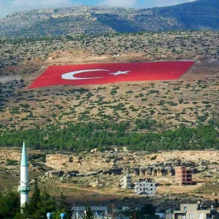 Türkiye'nin en büyük bayrağı Mersin'in MUT İlçesindedir.180X120 metre ebatlarında, 21.600 m² yani 21,6 dekar.